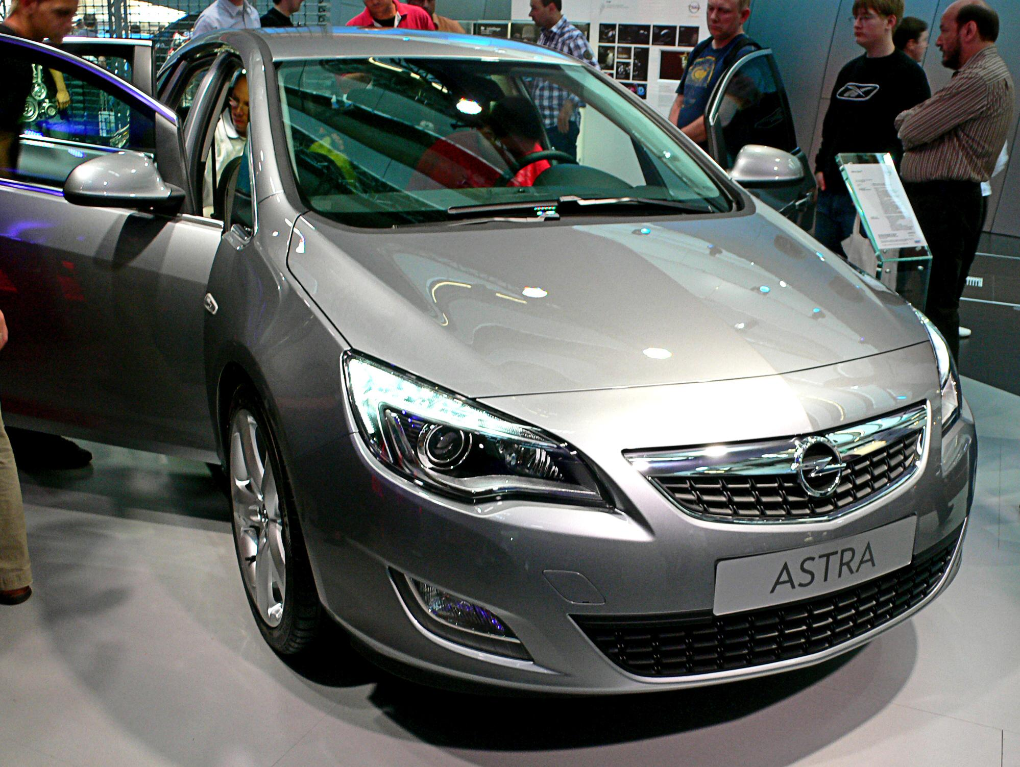 La quatrième génération de l'Opel Astra, présentée en première mondial au Salon de l'automobile de Francfort.